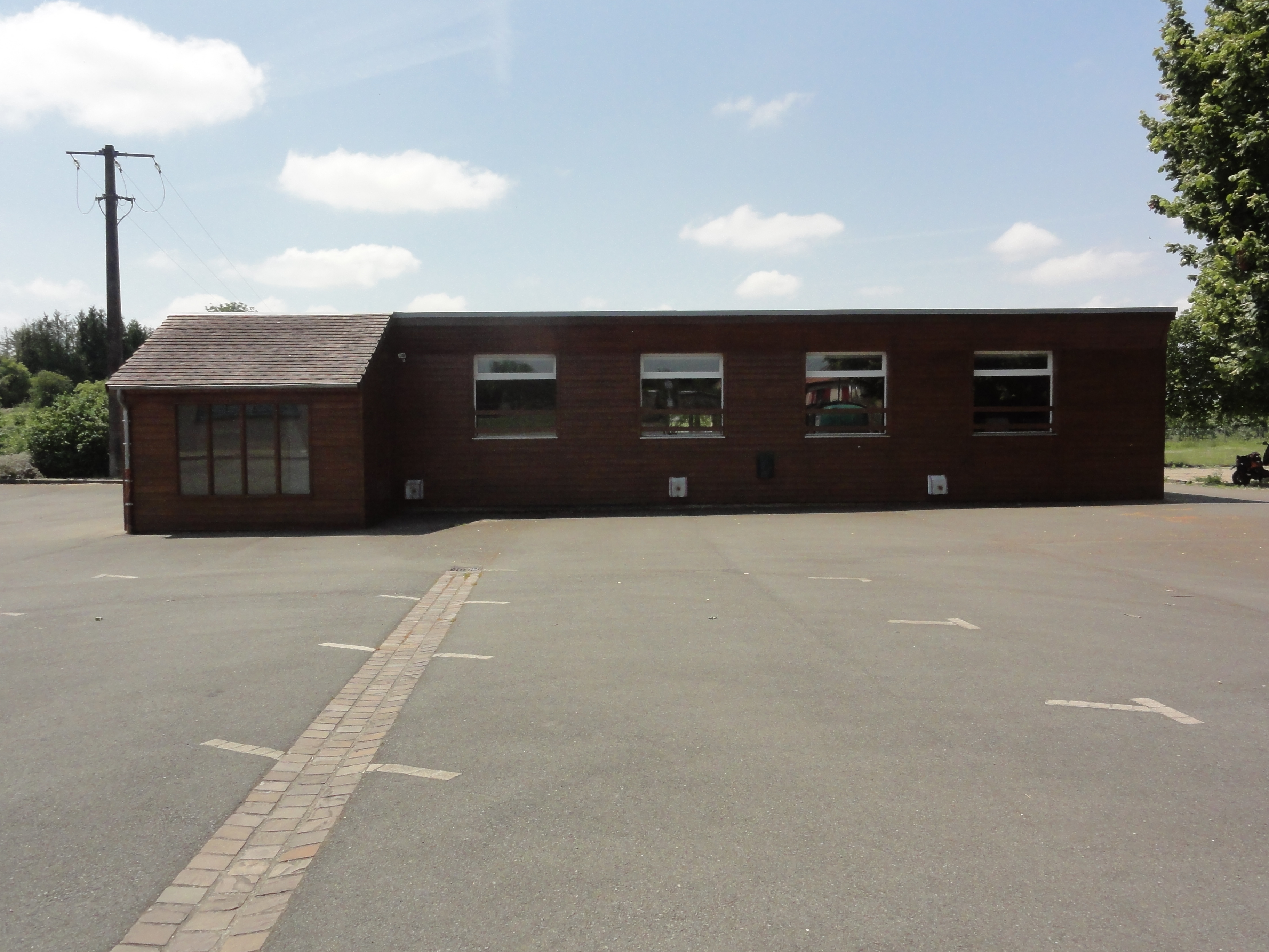 Saint-Victeur (Sarthe) salle polyvalente